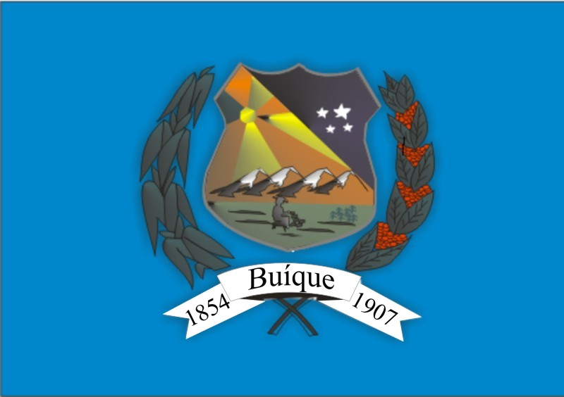 Bandeira do município de Buíque, Pernambuco. Buíque´s Flag, Pernambuco State, Brazil.